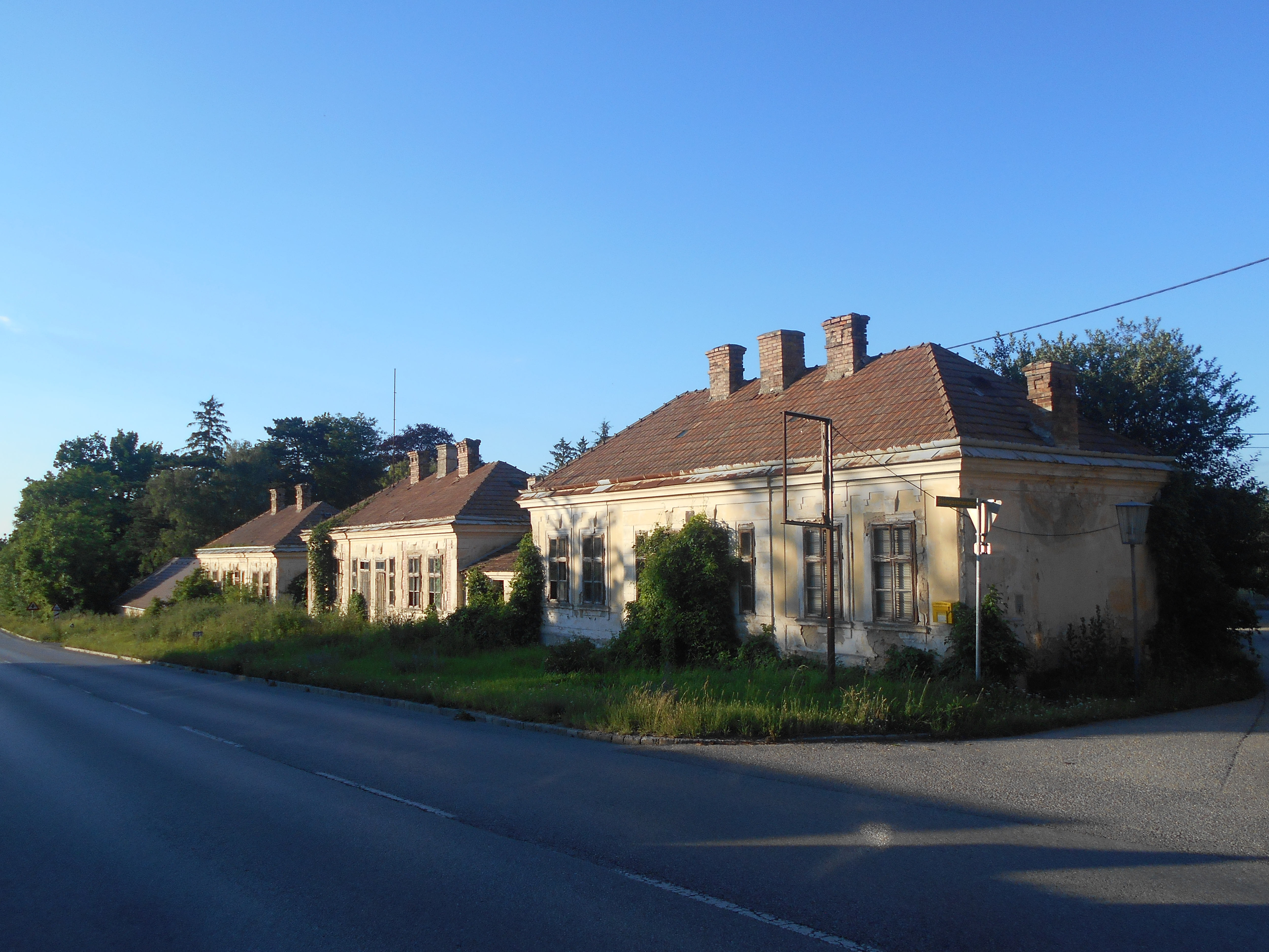 Arbeiterwohnhäuser der ehemaligen Ziegelei Frättingsdorf Diese Datei wurde im Rahmen von WikiDaheim 2020 in Österreich erstellt und hochgeladen.Sie wurde dem allgemeinen Themenbereich zugeordnet.